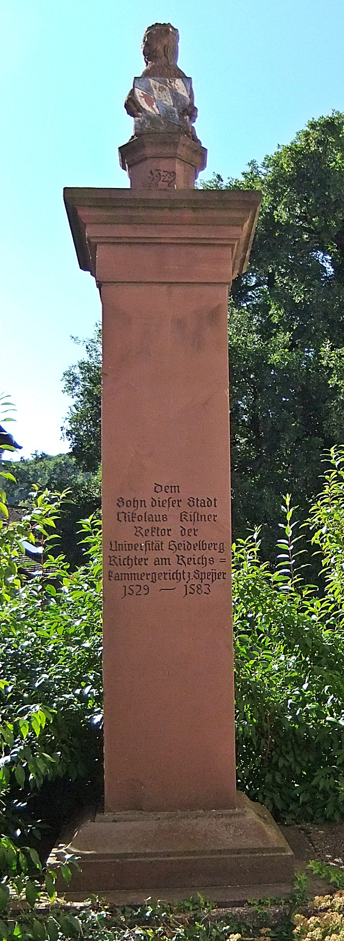 Mosbach: Denkmal für Nikolaus Cisnerus